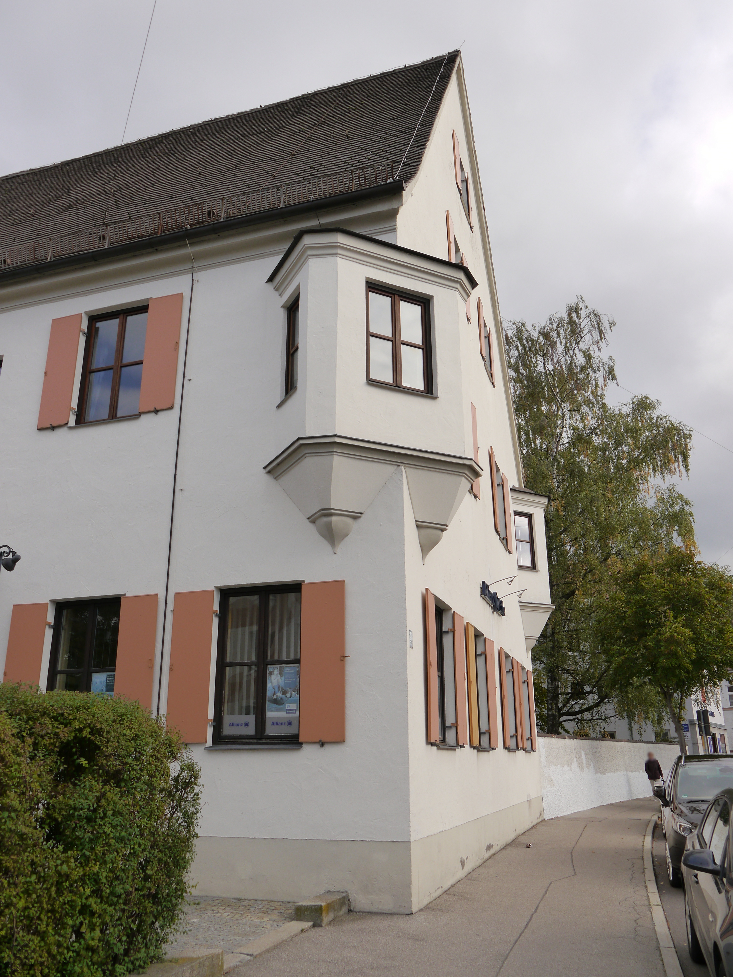 Ehemaliges AmtshausThis is a photograph of an architectural monument.